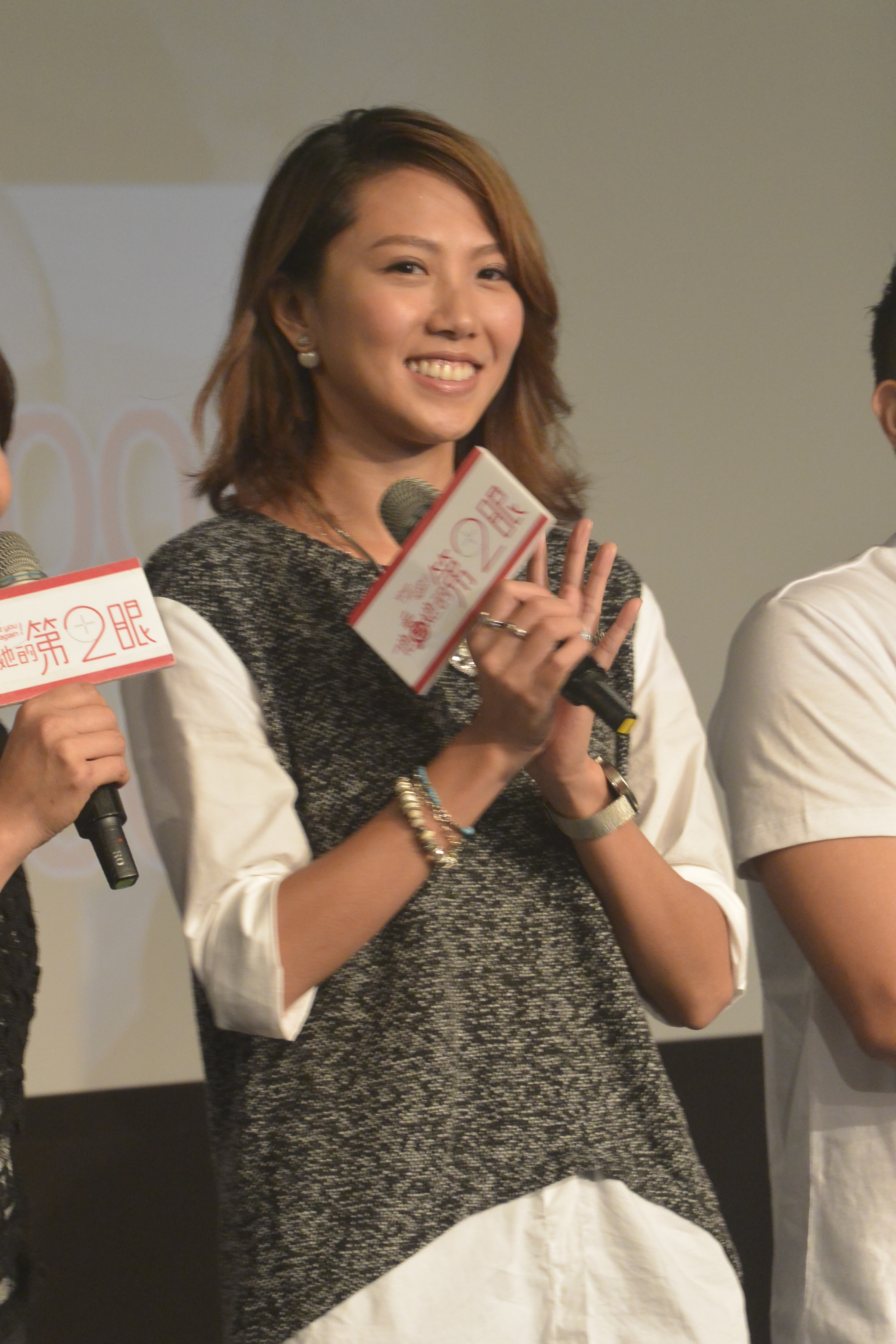 10/3 週日華劇 他看她的第2眼 最終回見面會